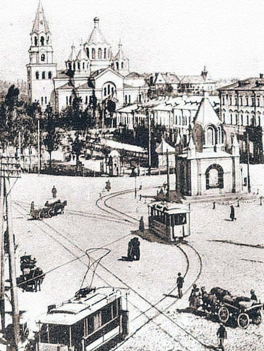 Вид на Спасо-Преображенський собор та каплицю у Житомирі. кінець XIX ст.